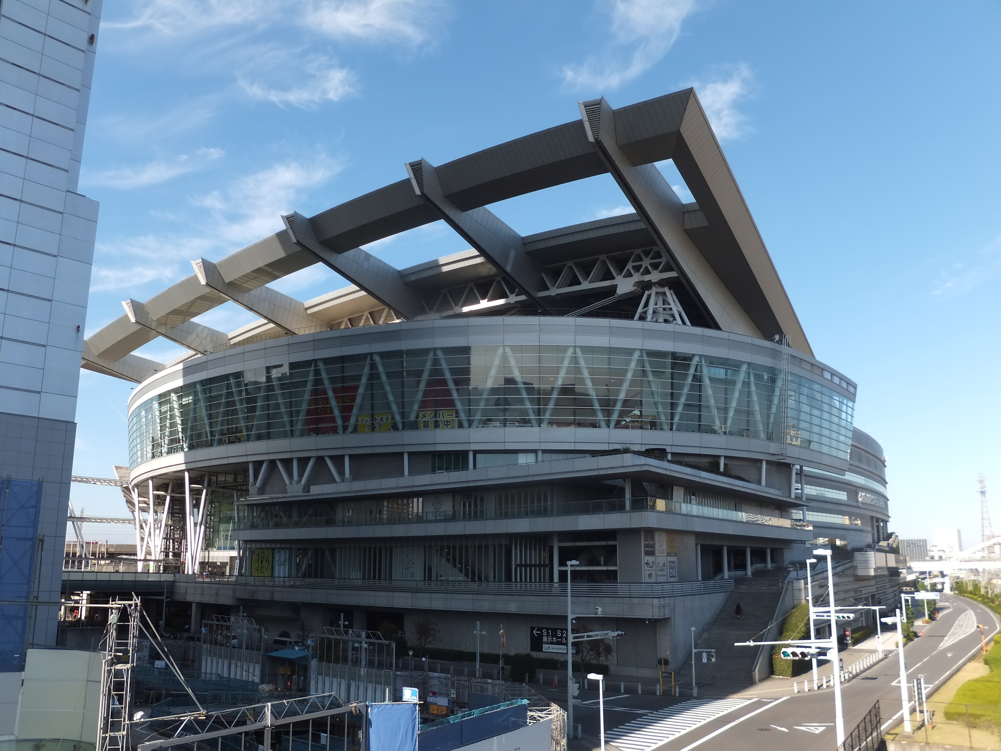 さいたまスーパーアリーナ